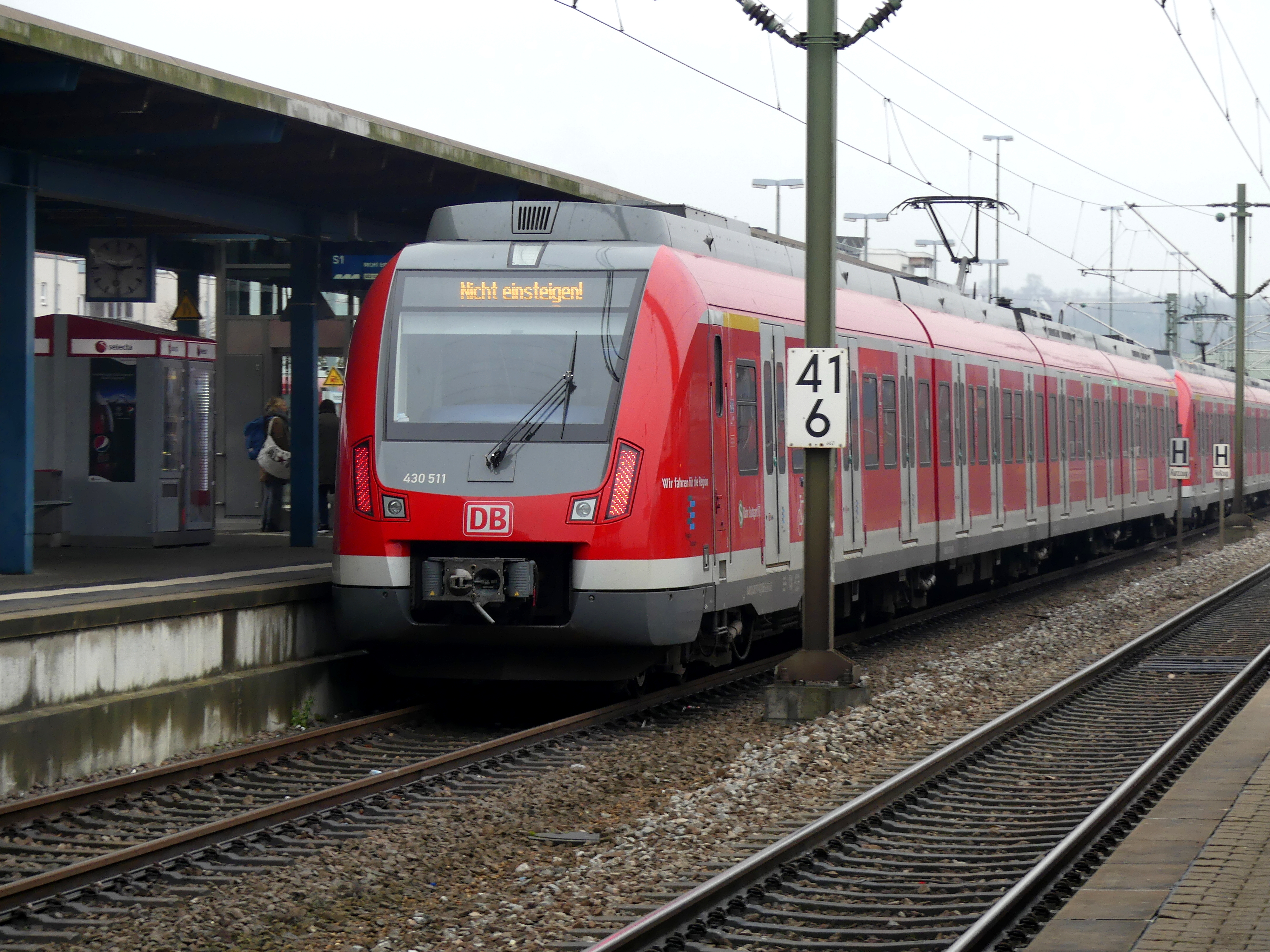 Eine in die Abstellanlage abfahrende S1 aus Kirchheim/T